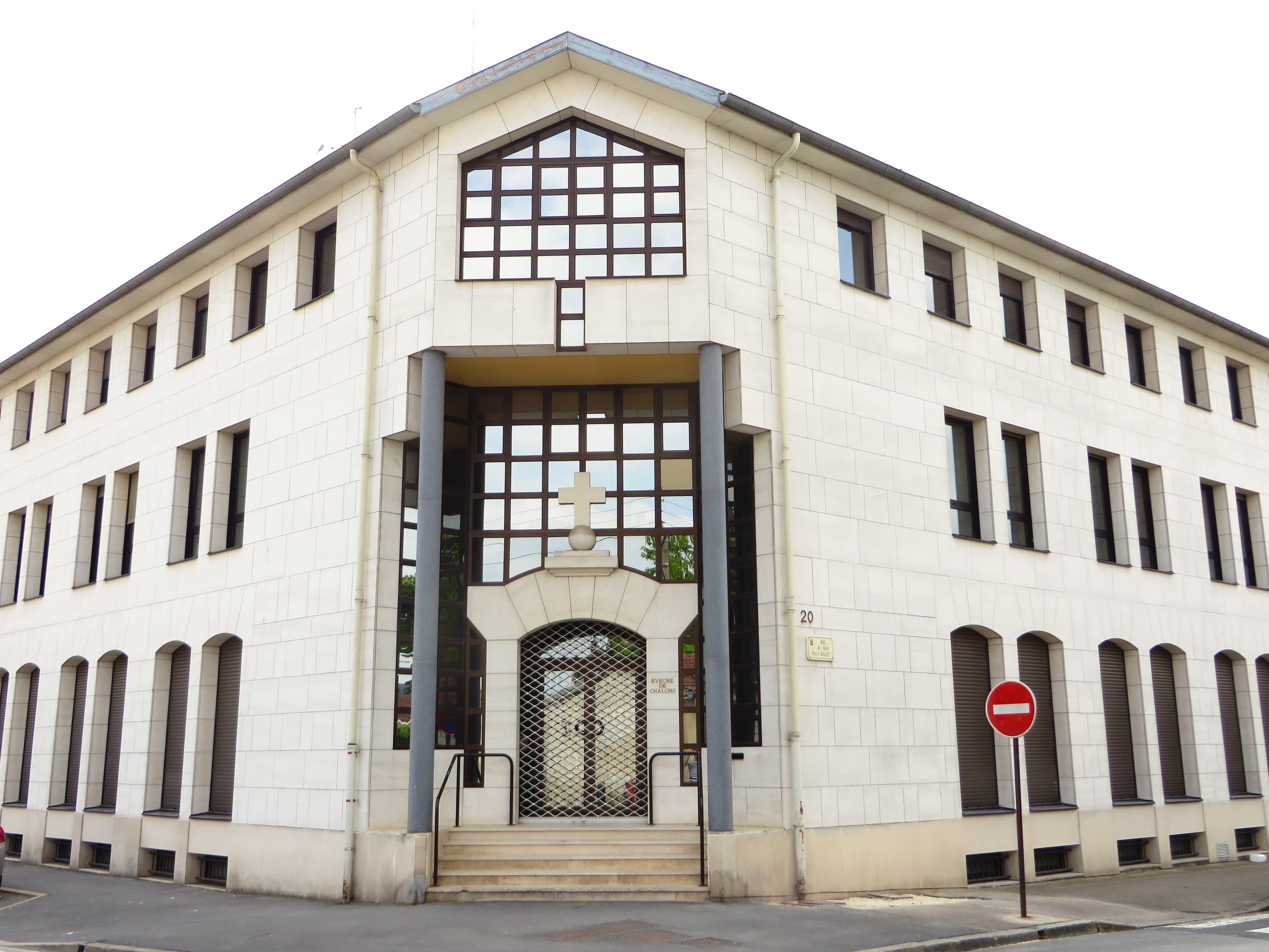 Châlons-en-Champagne L'évêché